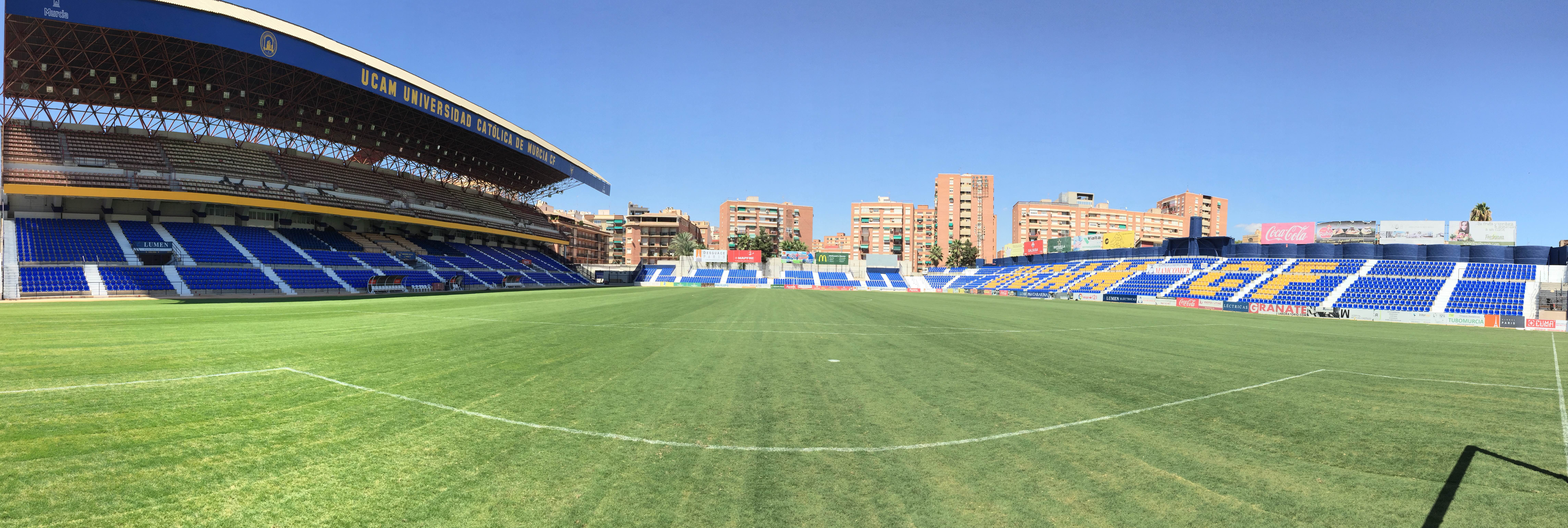 Aspecto de La Condomina tras las obras de acondicionamiento ejecutadas por el club tras el ascenso a Segunda División